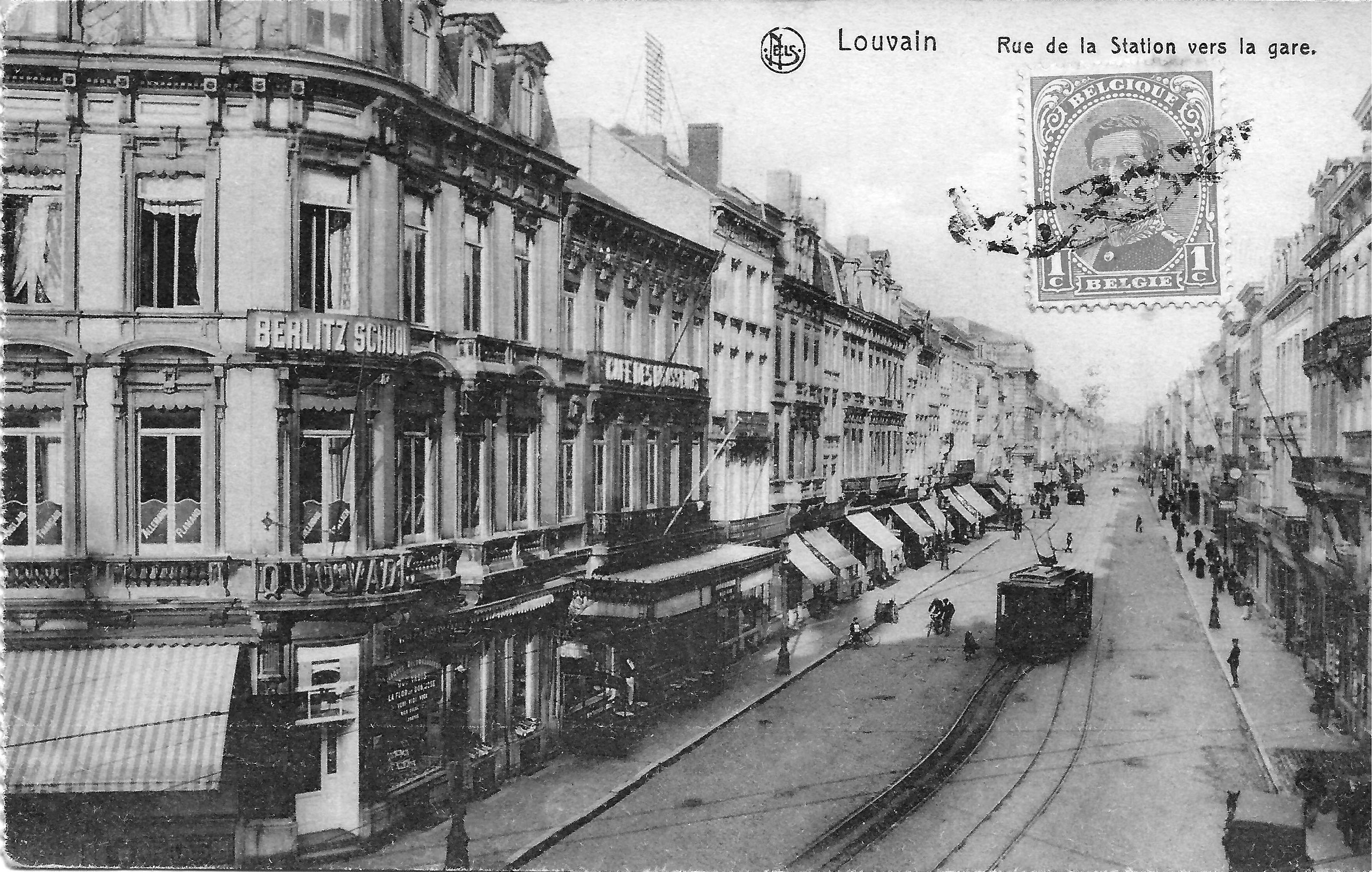 Briefkaart gepost in 1919 van Leuven stationsstraat met een tram die over een wissel rijdt.